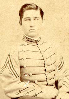 VMI Cadet Edward M. Tutwiler